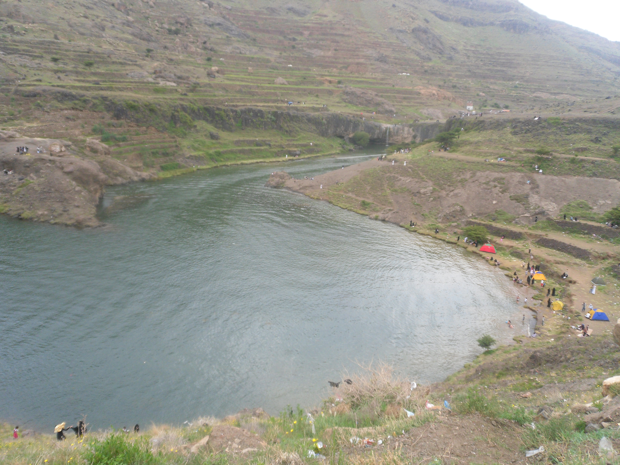 شلال بني مطر - محافظة صنعاء - 2012